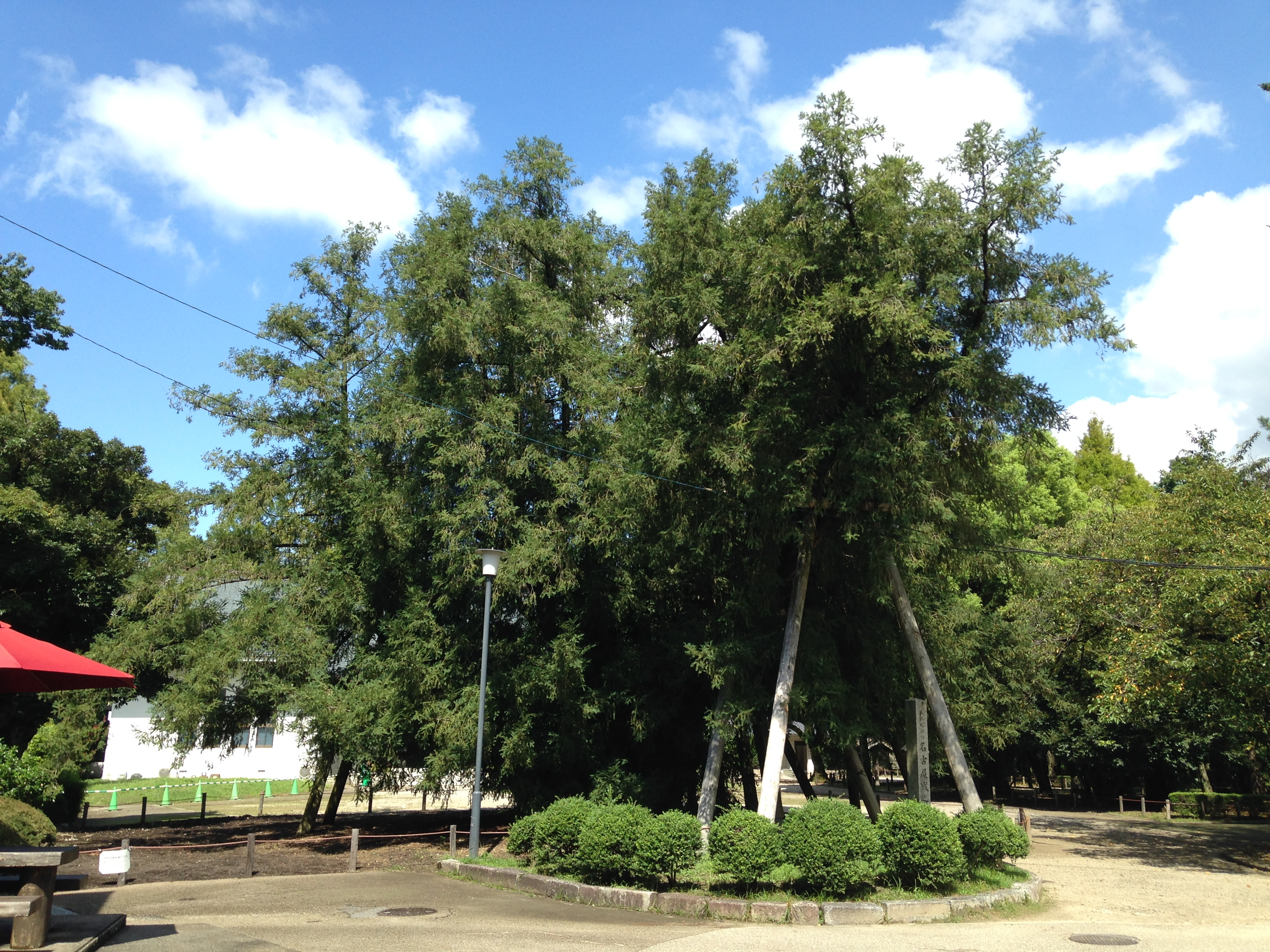 名古屋城・西の丸展示館前のカヤの木